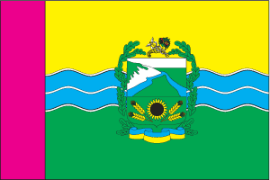 прапор Дворічанського району